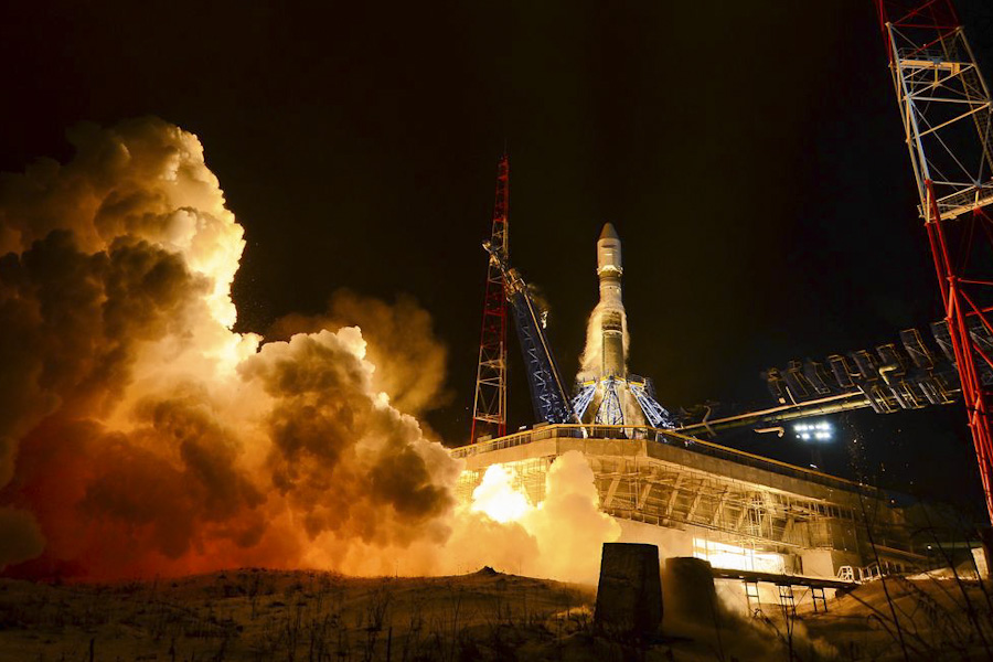 Воздушно-космические силы провели успешный пуск новой ракеты-носителя «Союз-2.1В» с космодрома Плесецк